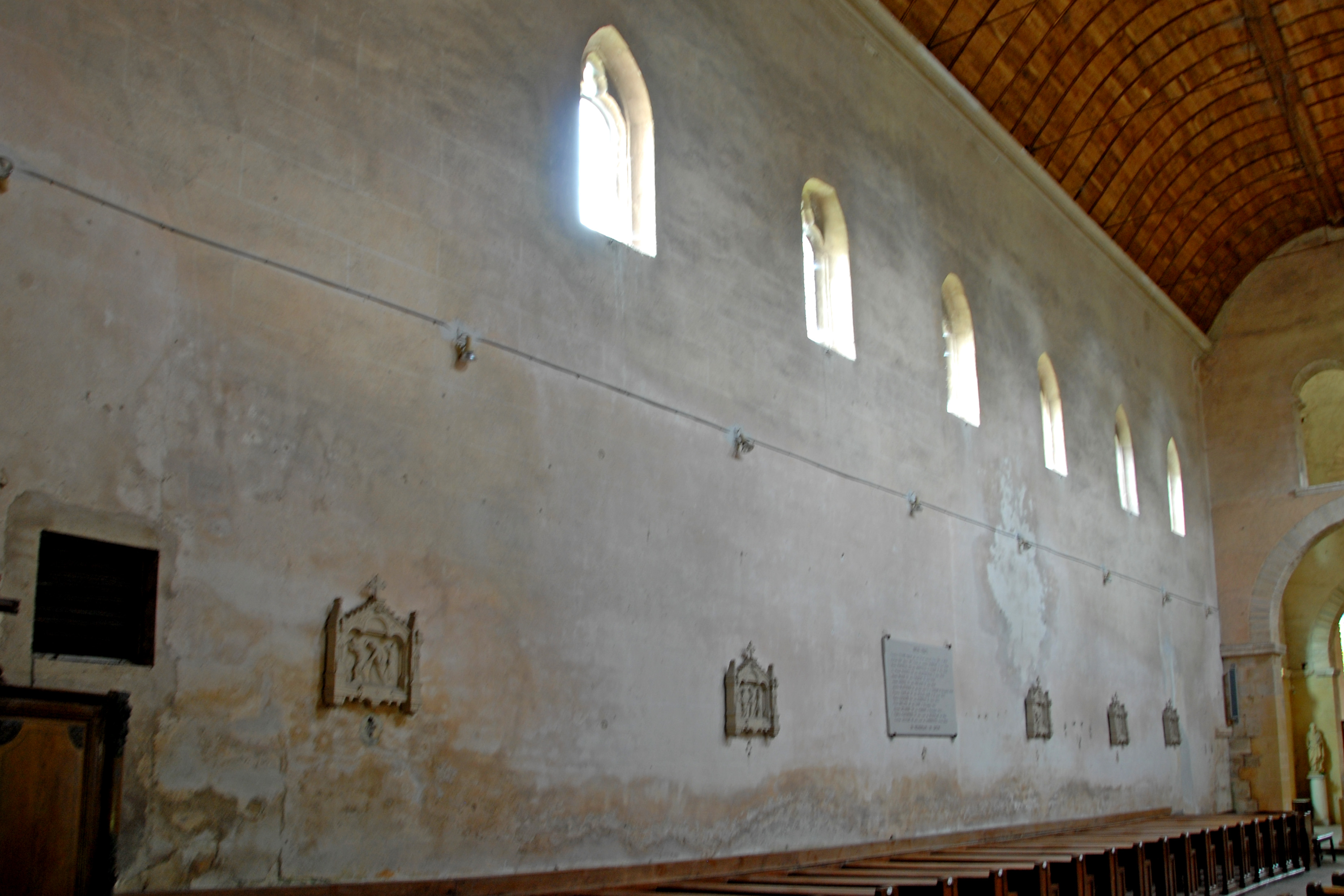 Prioratskirche, Hauptschiff, nordwestliche Außenwand